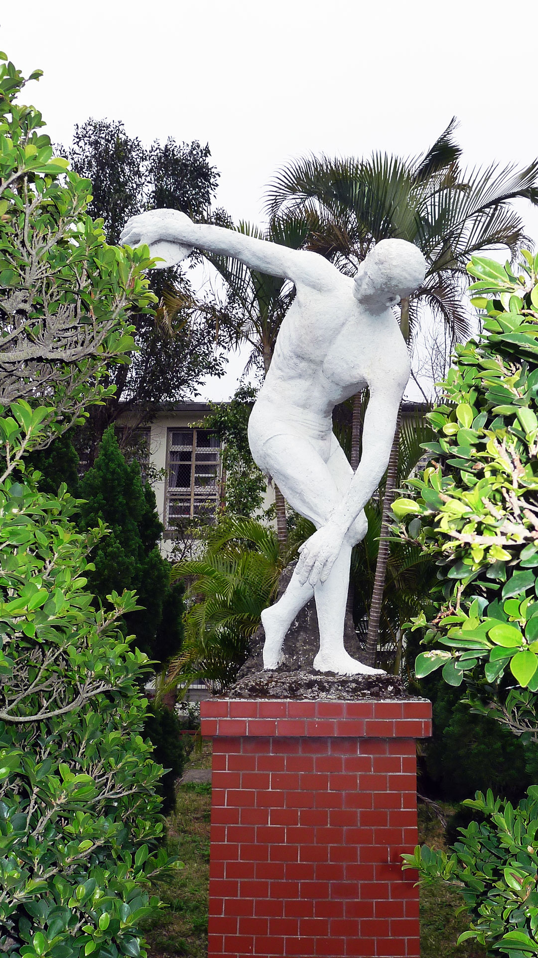 新竹市立建華國民中學擲鐵餅者雕像，為建華校友的共同記憶之一。